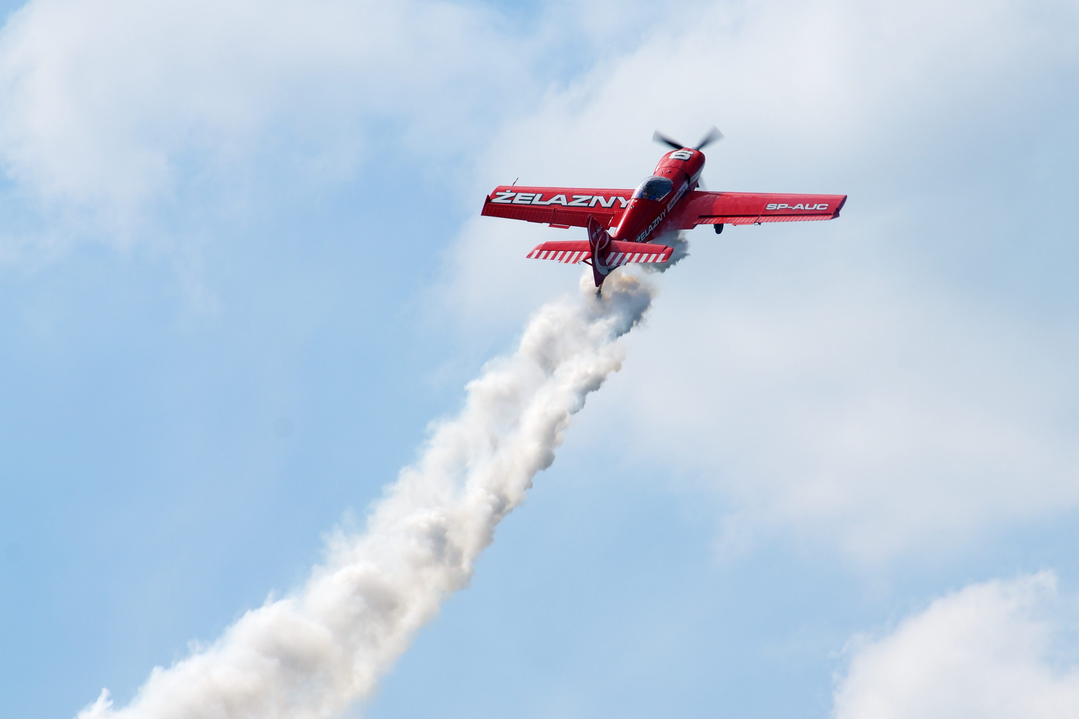 Góraszka 2009